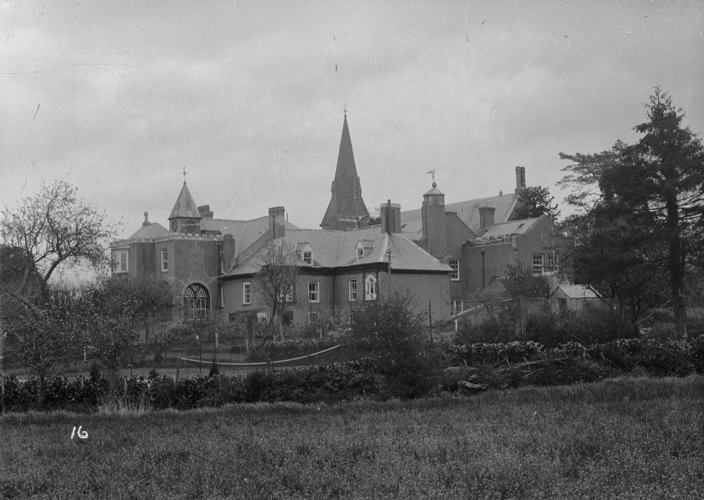 Abstract: Trefeca college